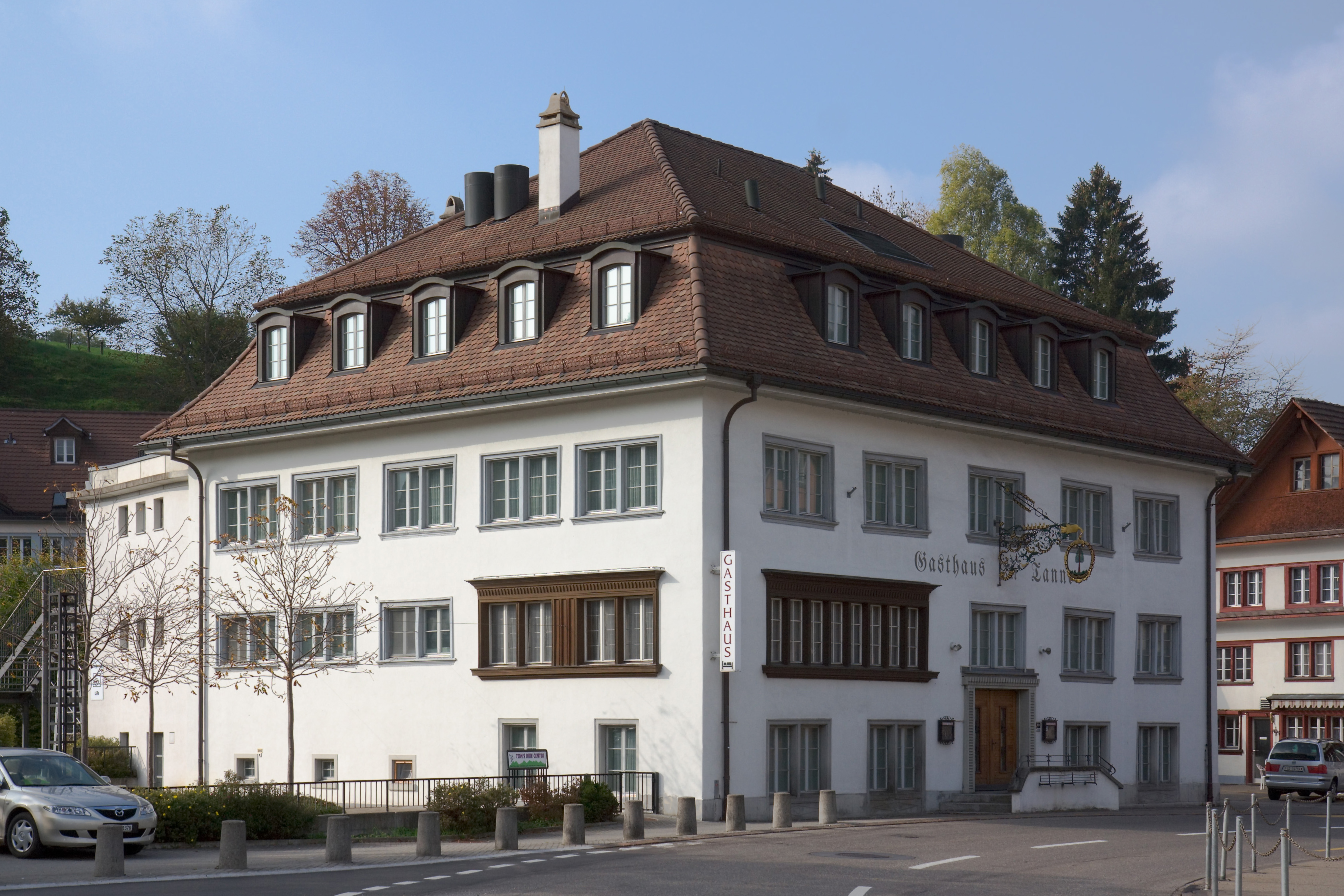 Gasthaus Tanne in Bauma, SchweizZum Zeitpunkt der Aufnahme war der Gasthof dauerhaft geschlossen.